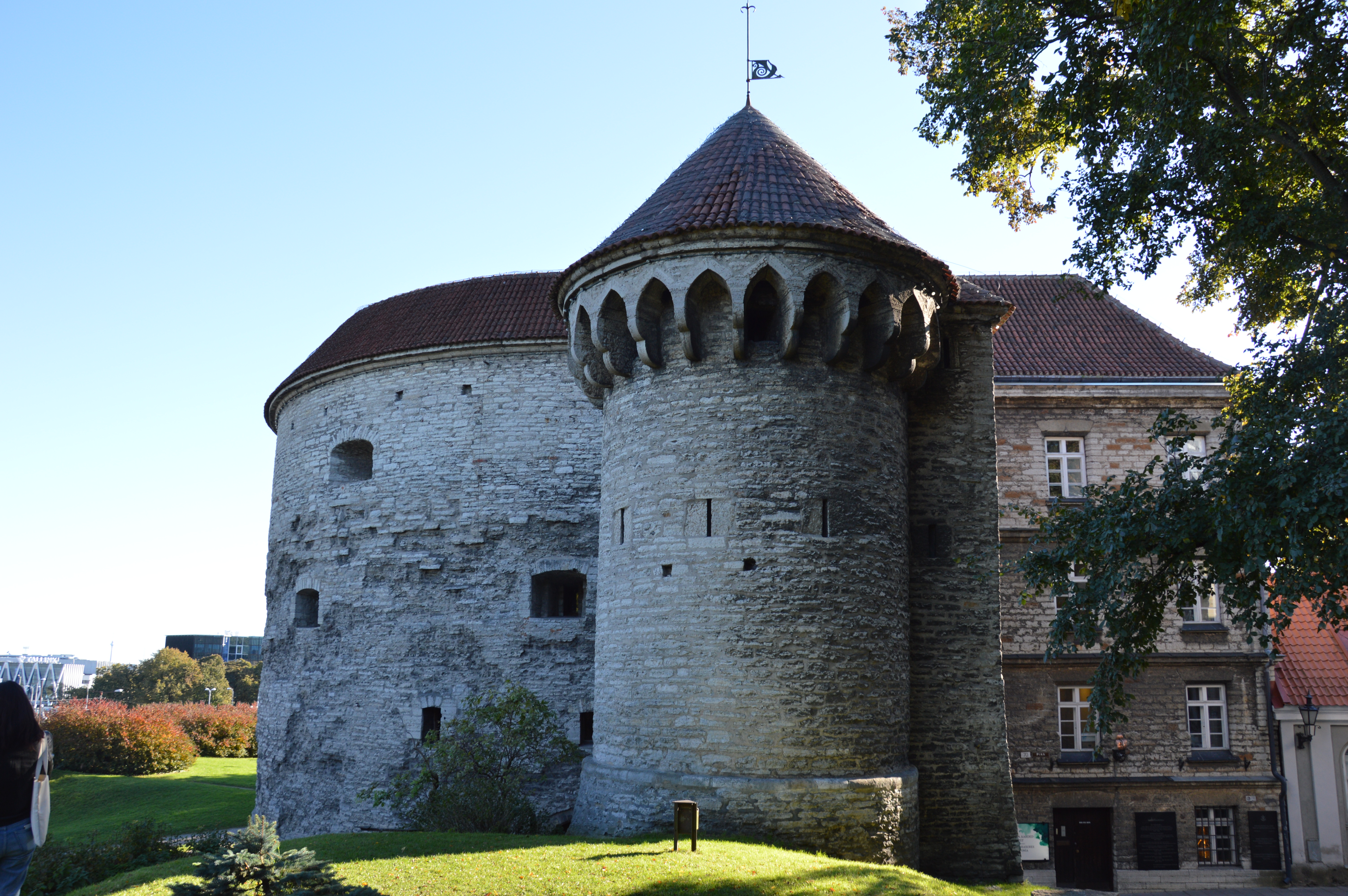 Dicke Margarete der Revaler Stadtbefestigung